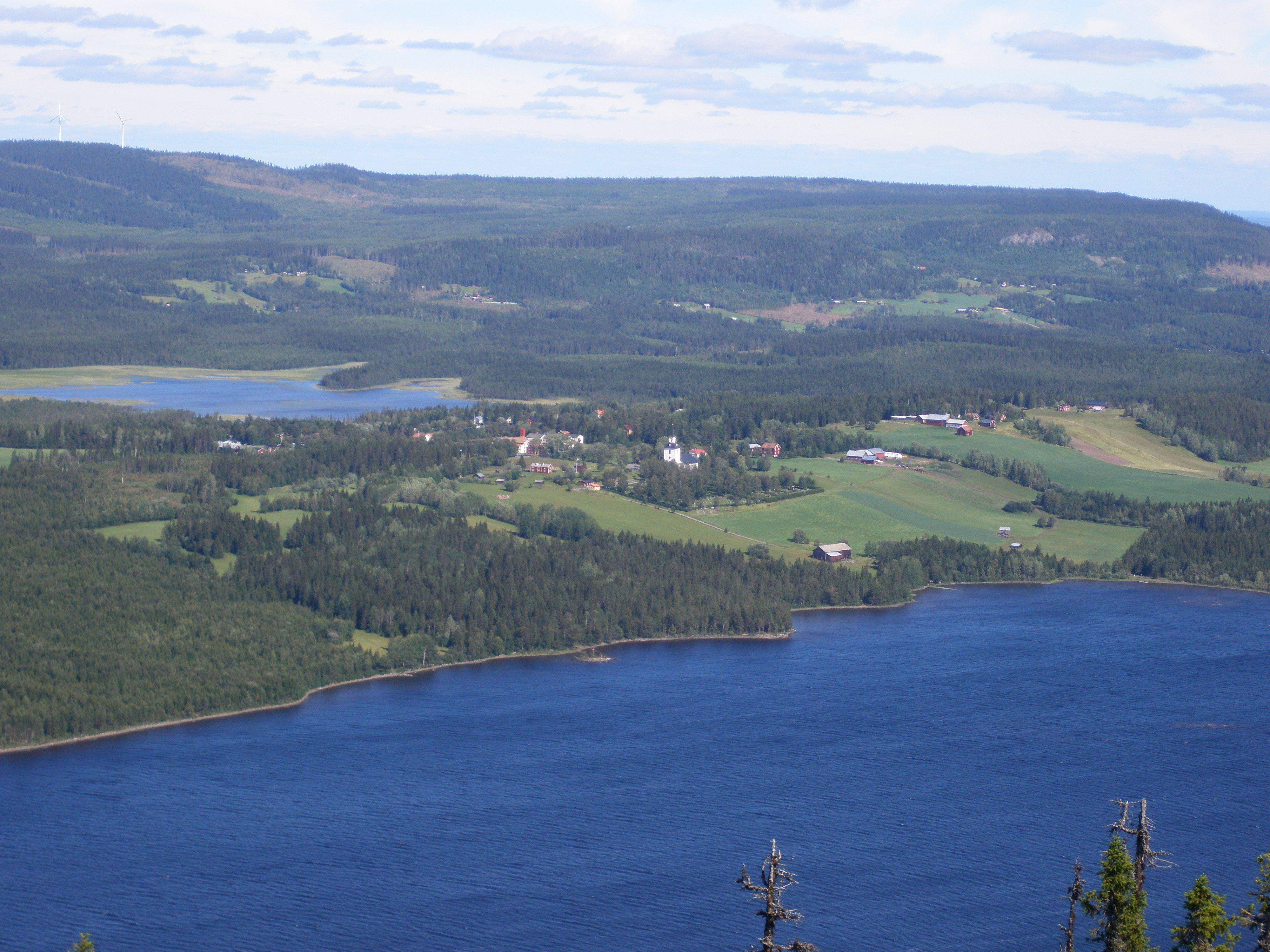 Ede, Offerdal, Jämtlands län, Sverige. Utsikt från Hällberget.